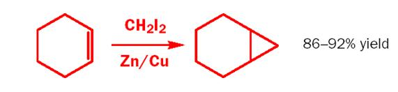 trabalho carbenos química orgânica avançada